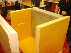 Cellule réalisée pour tester les propriétés thermiques du papercrete (Section Domotique du Lycée Charles de Gaulle de Muret / DP6h du CSES jean Lagarde)